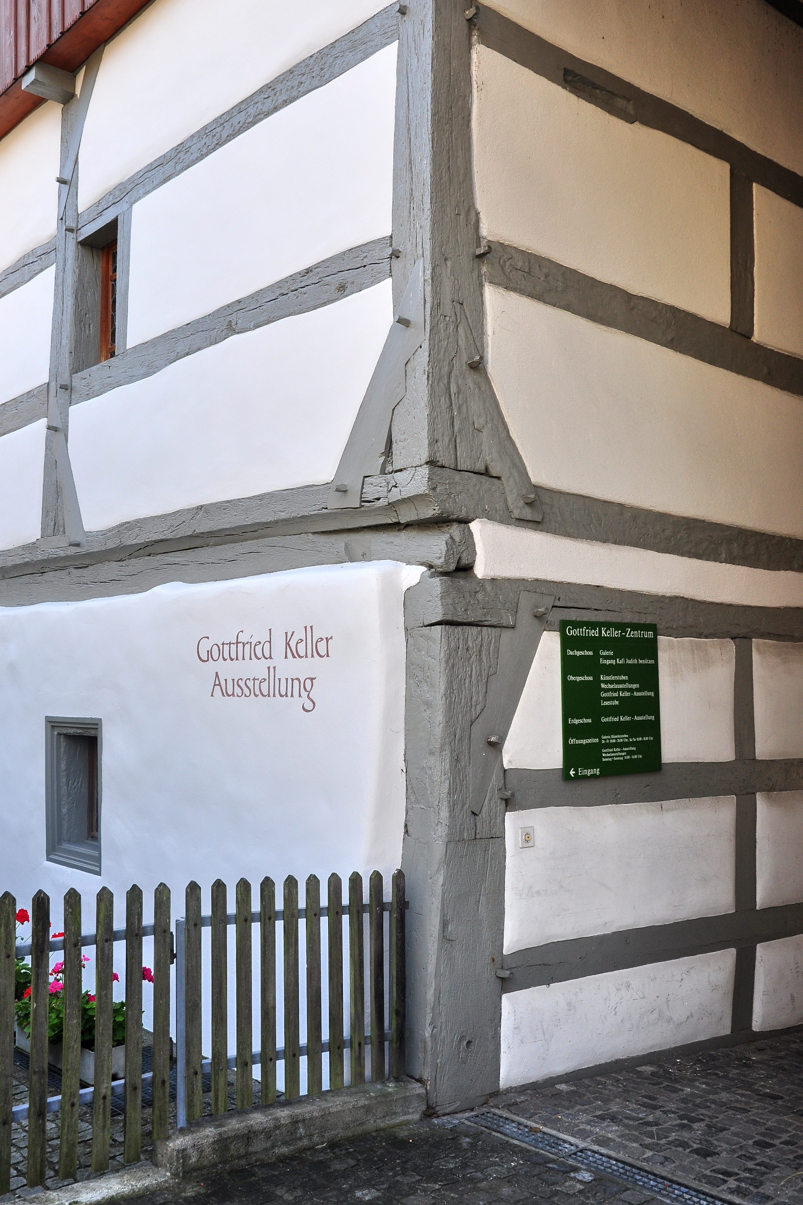 Klingelehaus (Gottfried-Keller-Zentrum), Gottfried-Keller-Strasse 8 in Glattfelden (Switzerland) with a hewn jetty